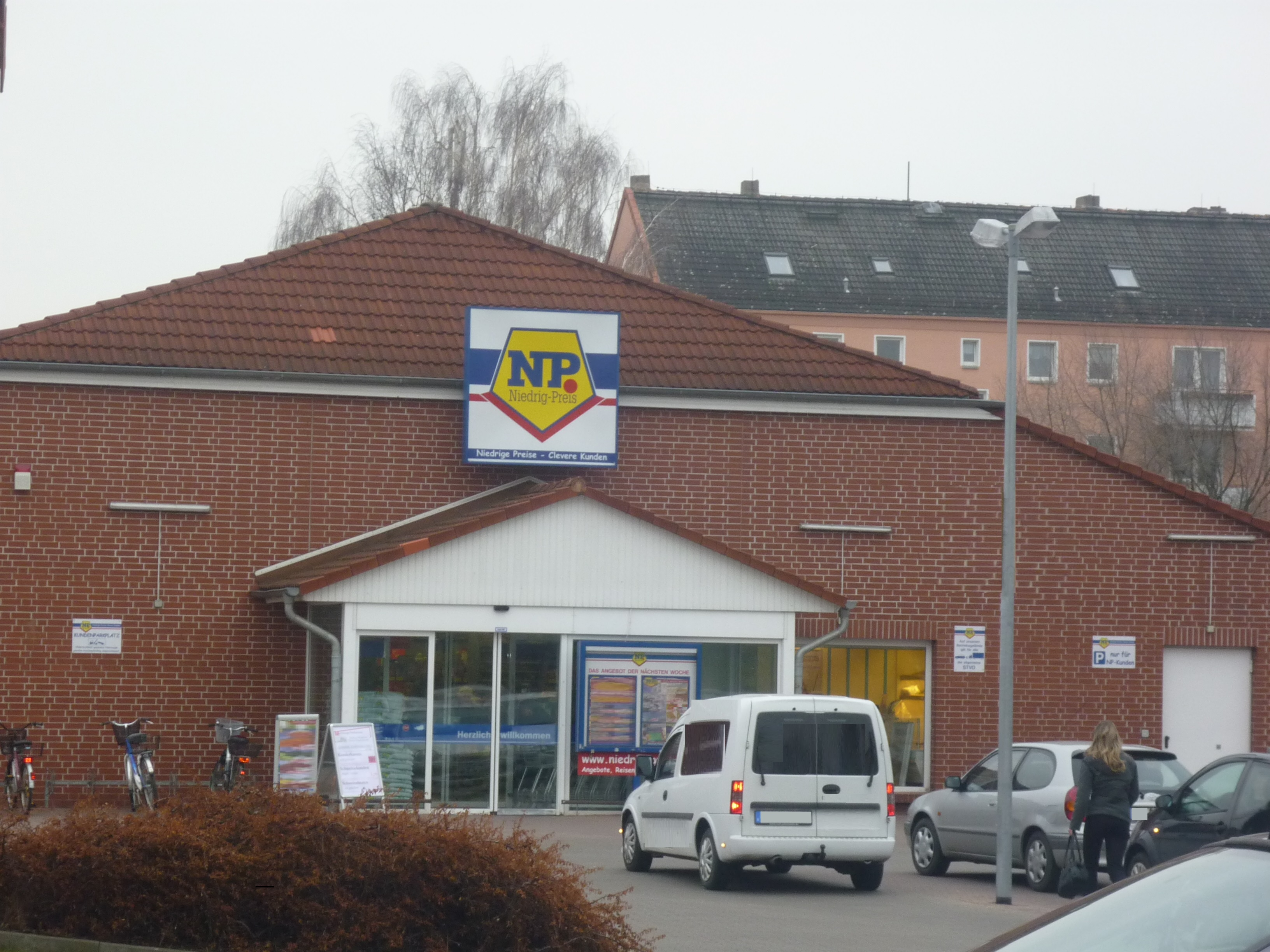 NP Markt in Löderburg